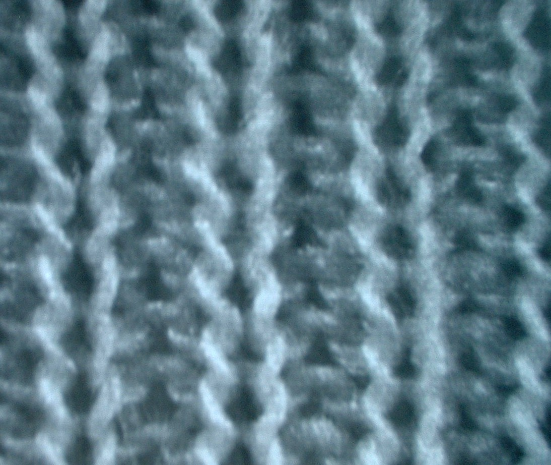 Glatte RR-Bindung im Gestrick